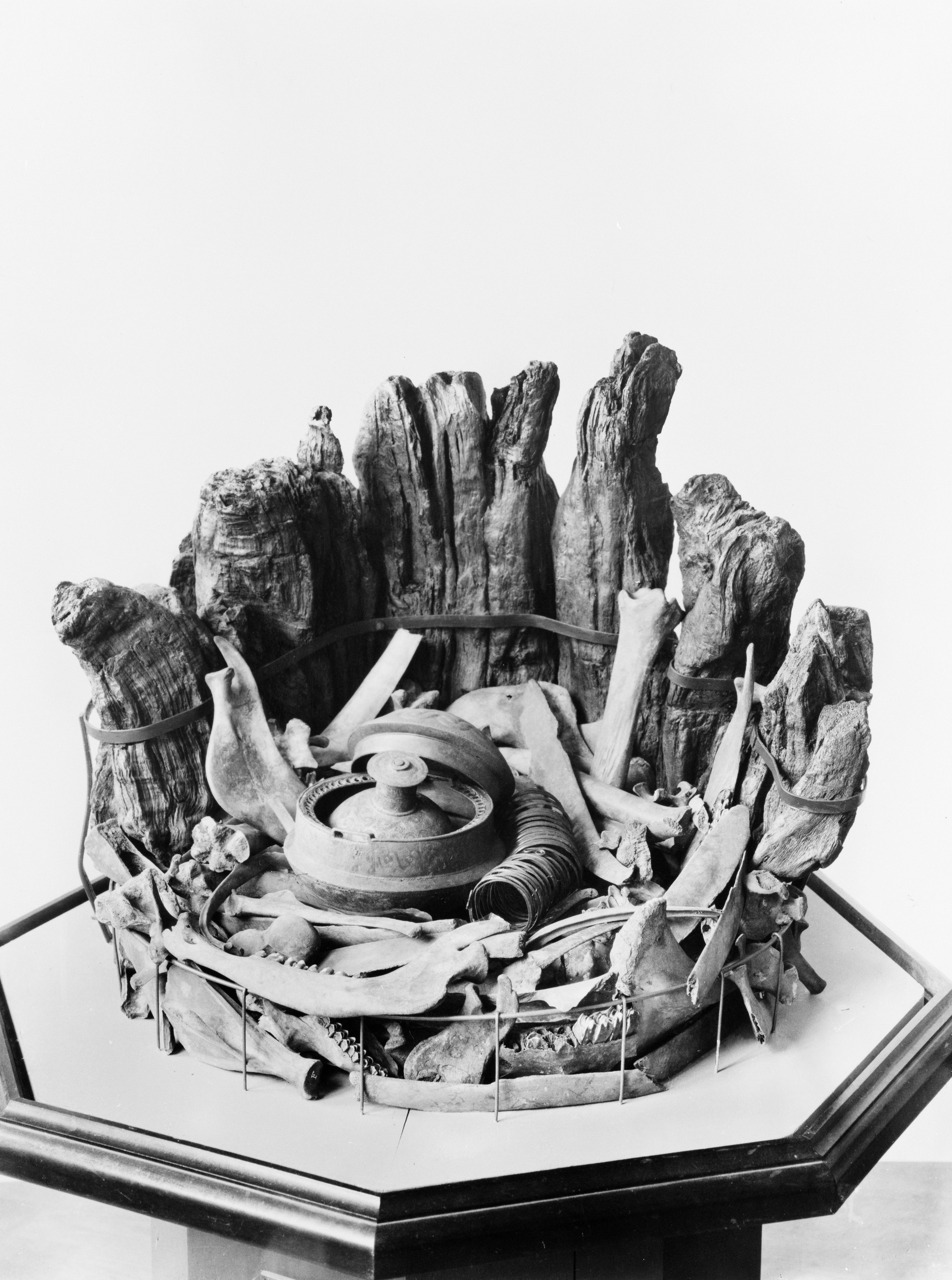 Offerbrønd fra Budsene. Yngre bronzealder.